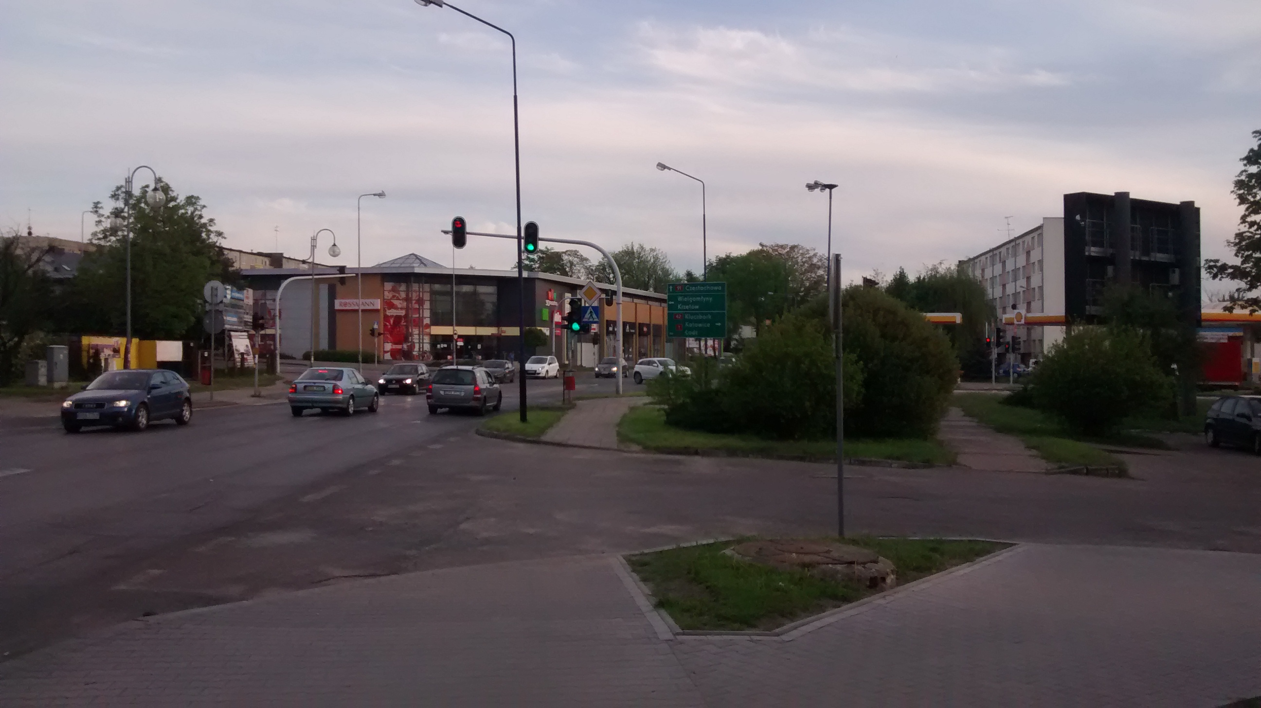 Skrzyżowanie - Krakowska, Piastowska, Brzeźnicka